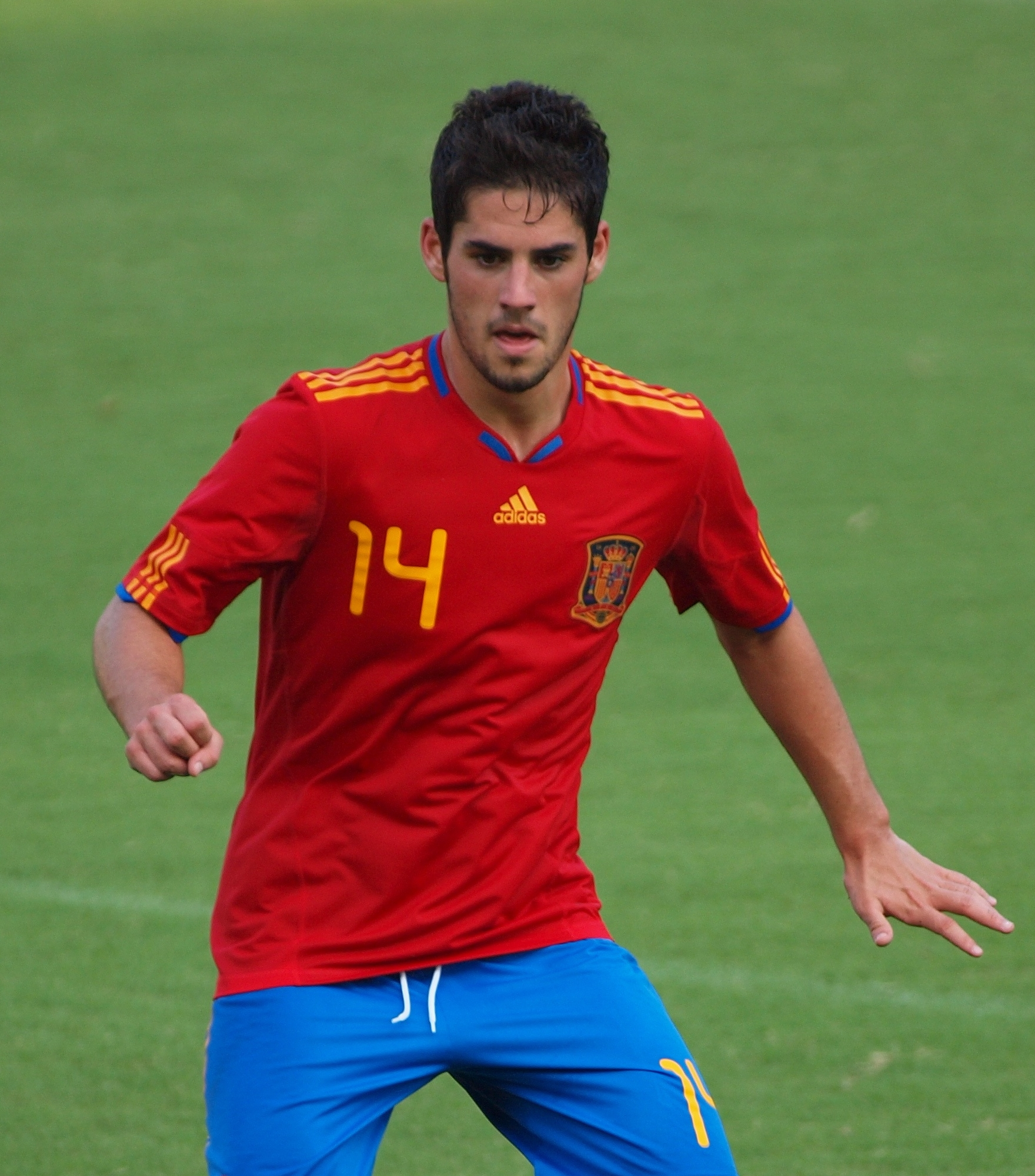 Francisco "Isco" Román Alarcón Suárez